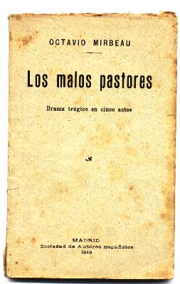 couverture de la traduction espagnole de Les Mauvais bergers, d'Octave Mirbeau (1847-1917)